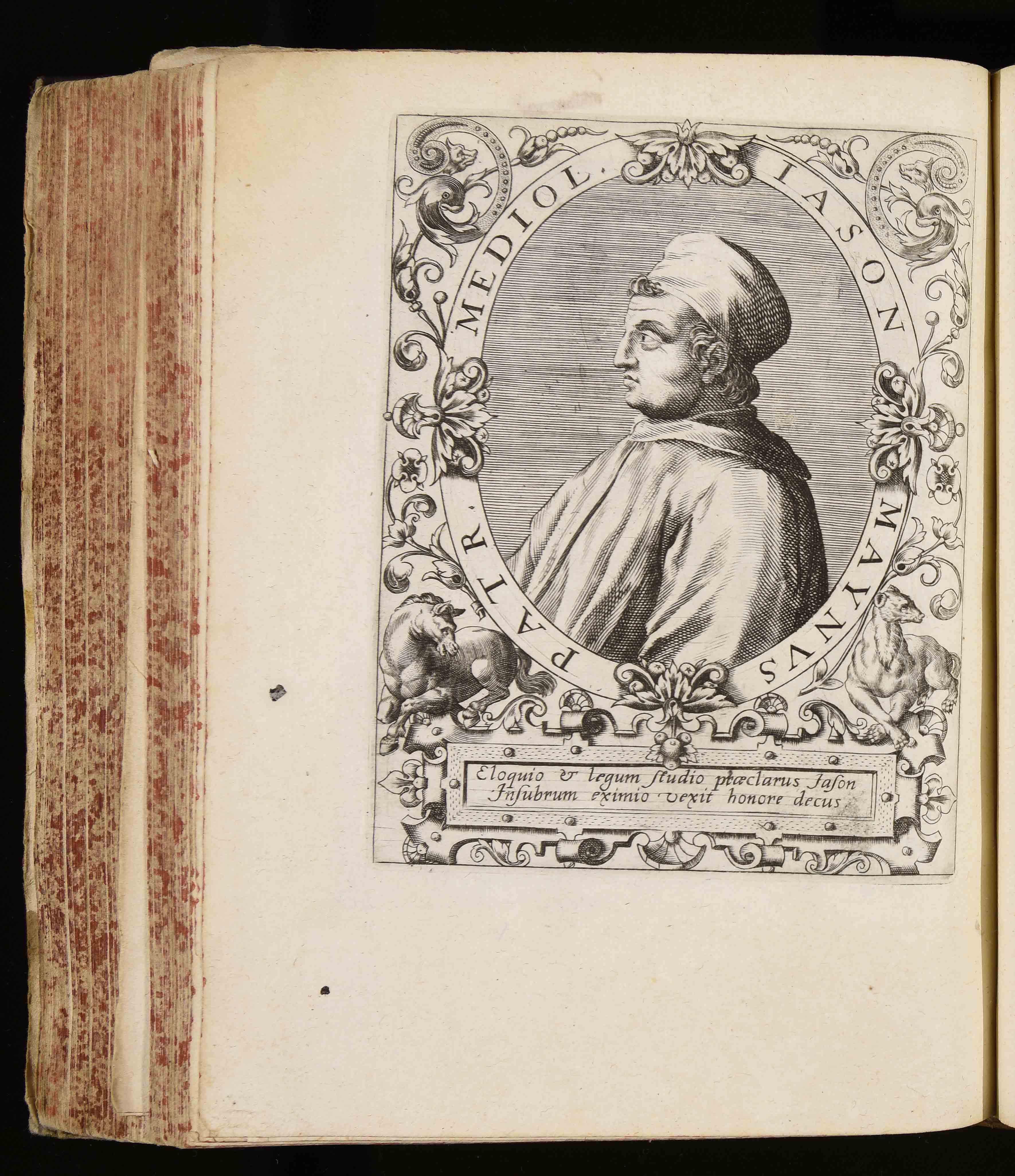 Calcografia in Jean Jacques Boissard, Bibliotheca sive Thesaurus virtutis, Frankfurt am Mein: William Fitzer 1627. Esemplare GI 1 v. c 41 della Biblioteca comunale di Trento, che presenta aggiunte successive.